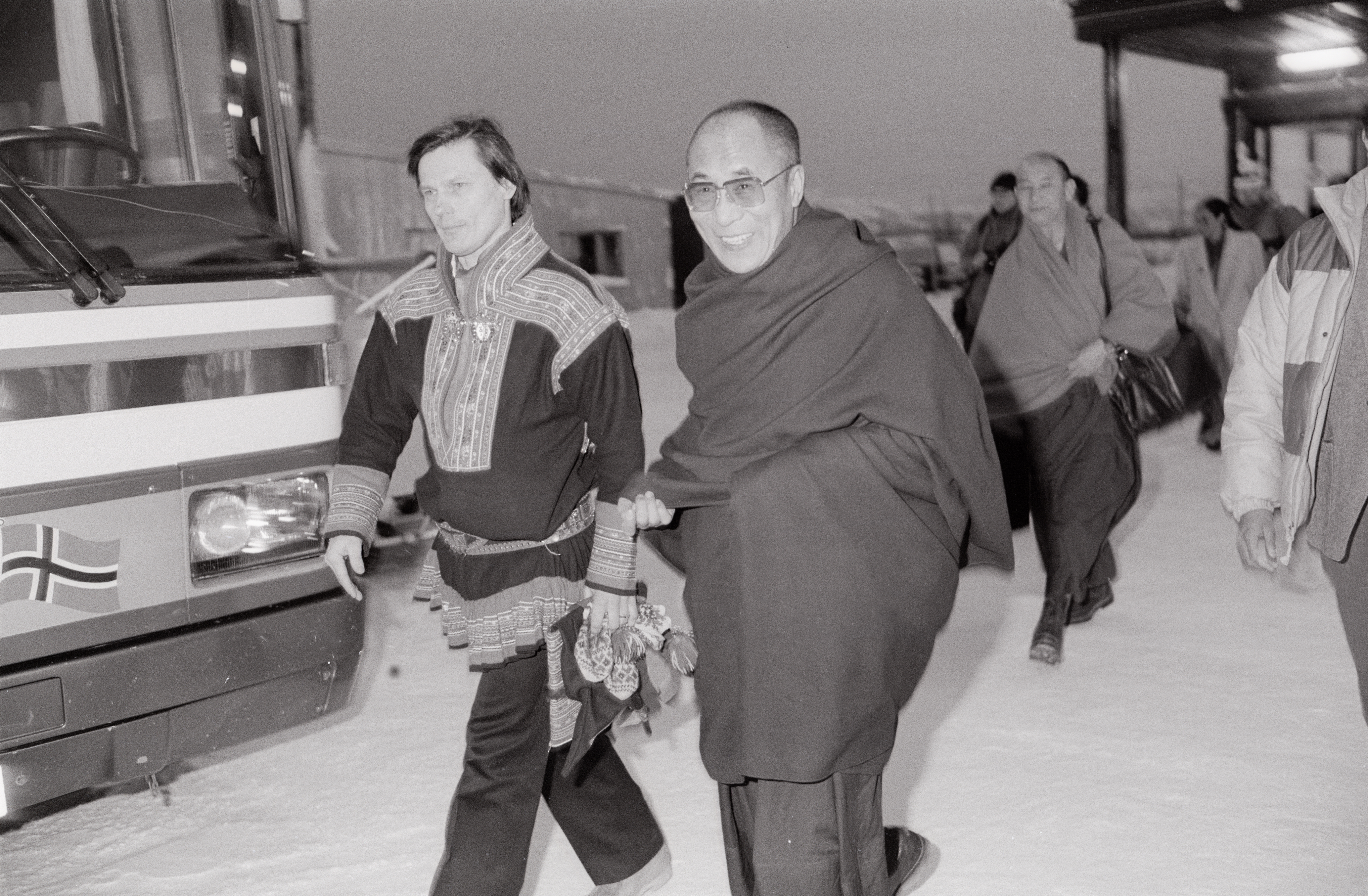 Den 14. Dalai Lama besøkte Sametinget og Karasjok i 1989 i forbindelse med sitt besøk i Norge i forbindelse med at han vant Nobels fredspris. Foto: Harry johansen.